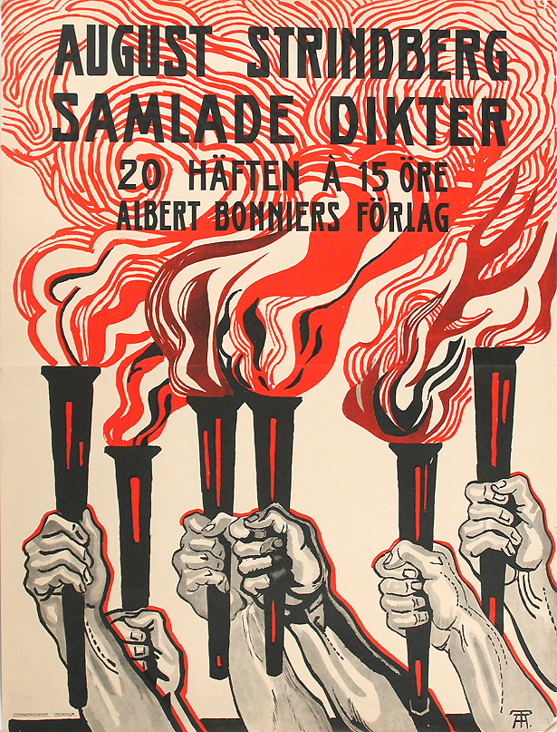 Utgivning: Albert Bonniers förlag. Ämnesord: Bokutgivning. Motiv: Fackeltåg, Brandfacklor. Inscannad av: Olof Halldin